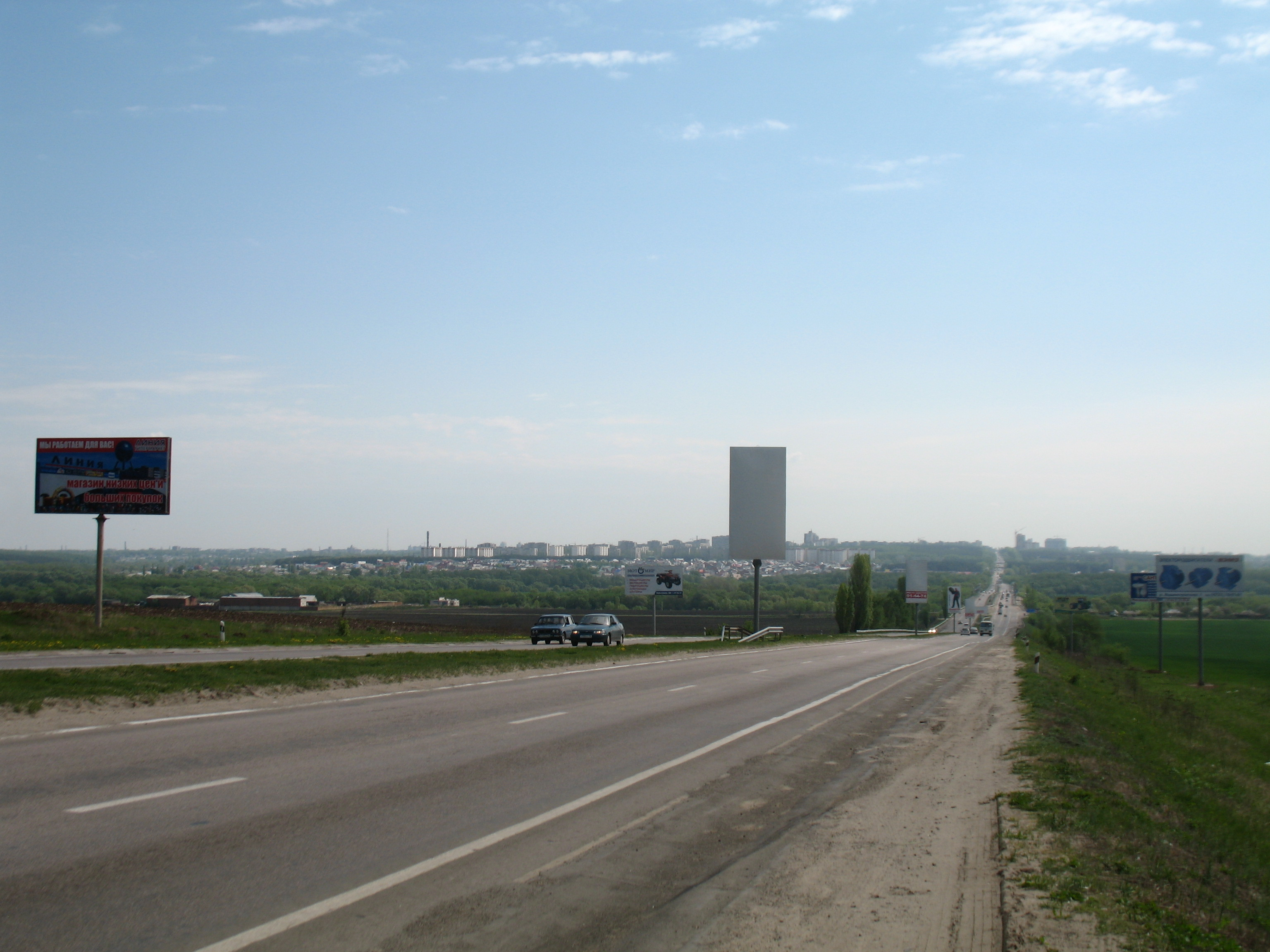 Въезд в Воронеж по трассе А144 со стороны Курска, 10 мая 2009 г.